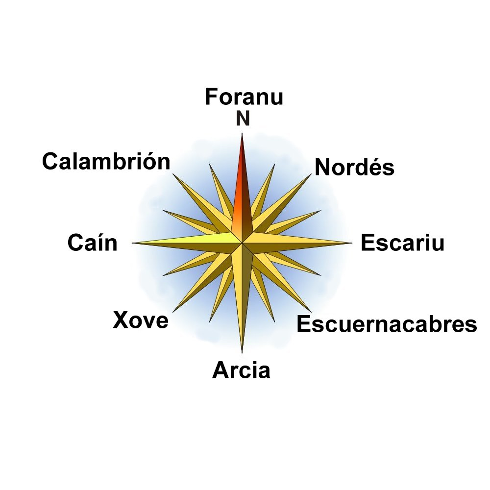 Menes de vientos